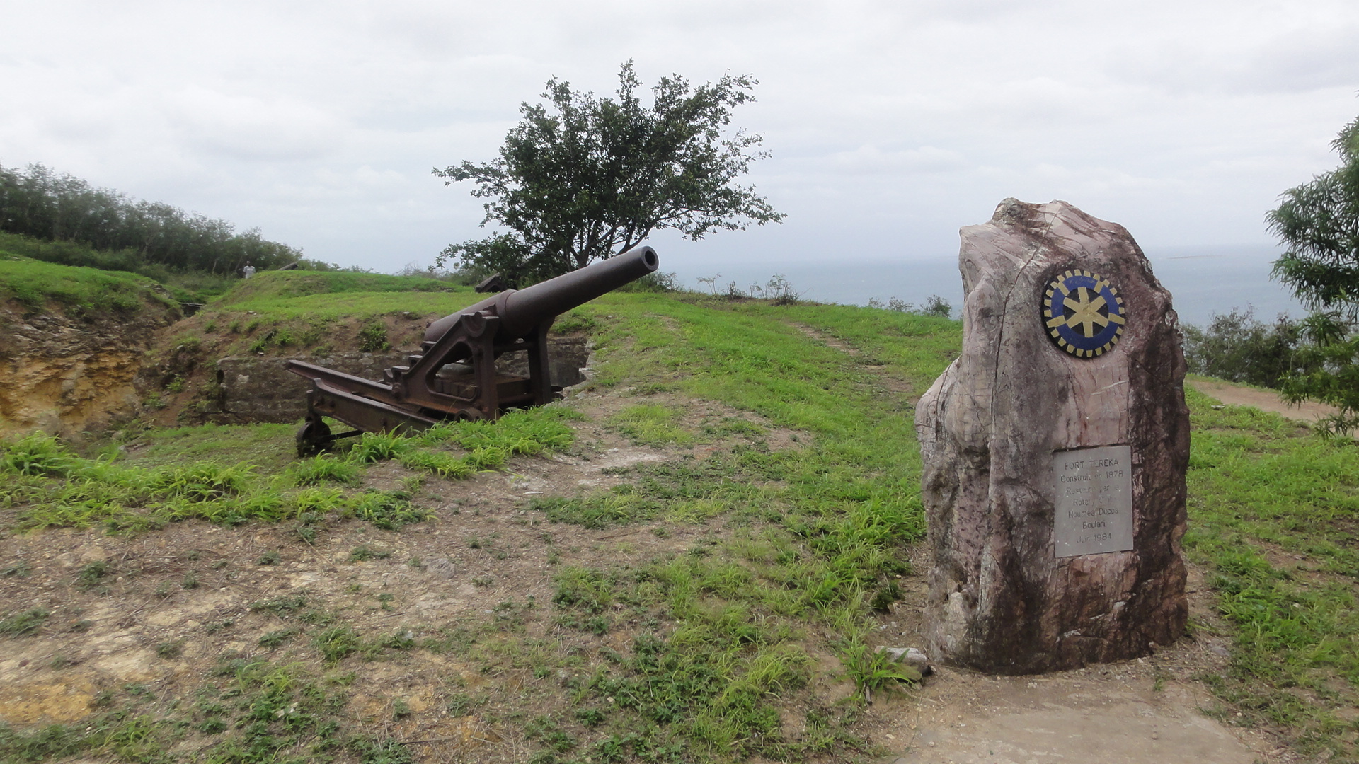 Canons, datant de 1877, situés au sommet du fort Téréka